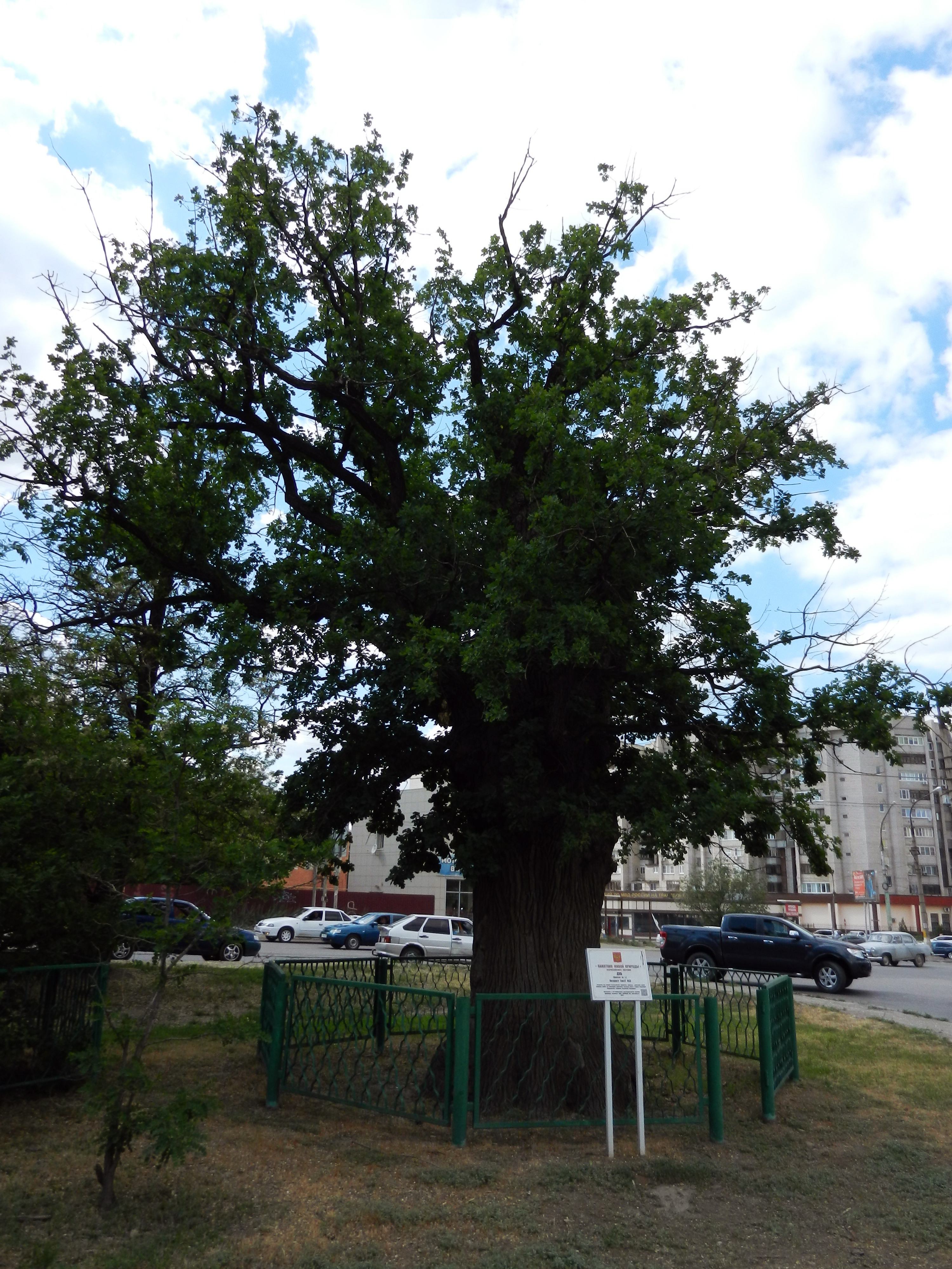 Дуб черешчатый: ул. Генерала Герасименко, Астрахань, Астраханская область This image is related to the protected area of Russia number 3090075